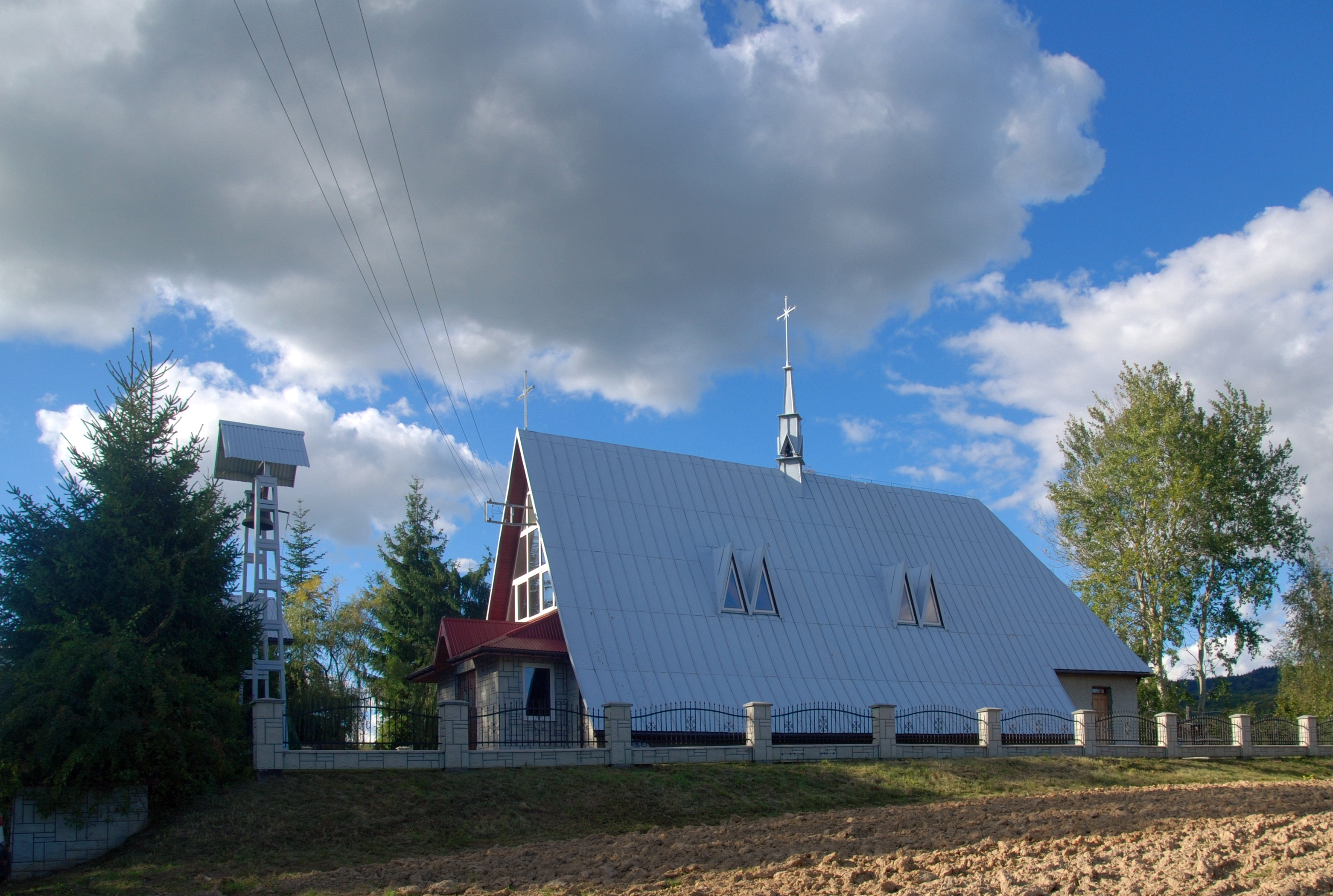 wieś Lipnica Górna